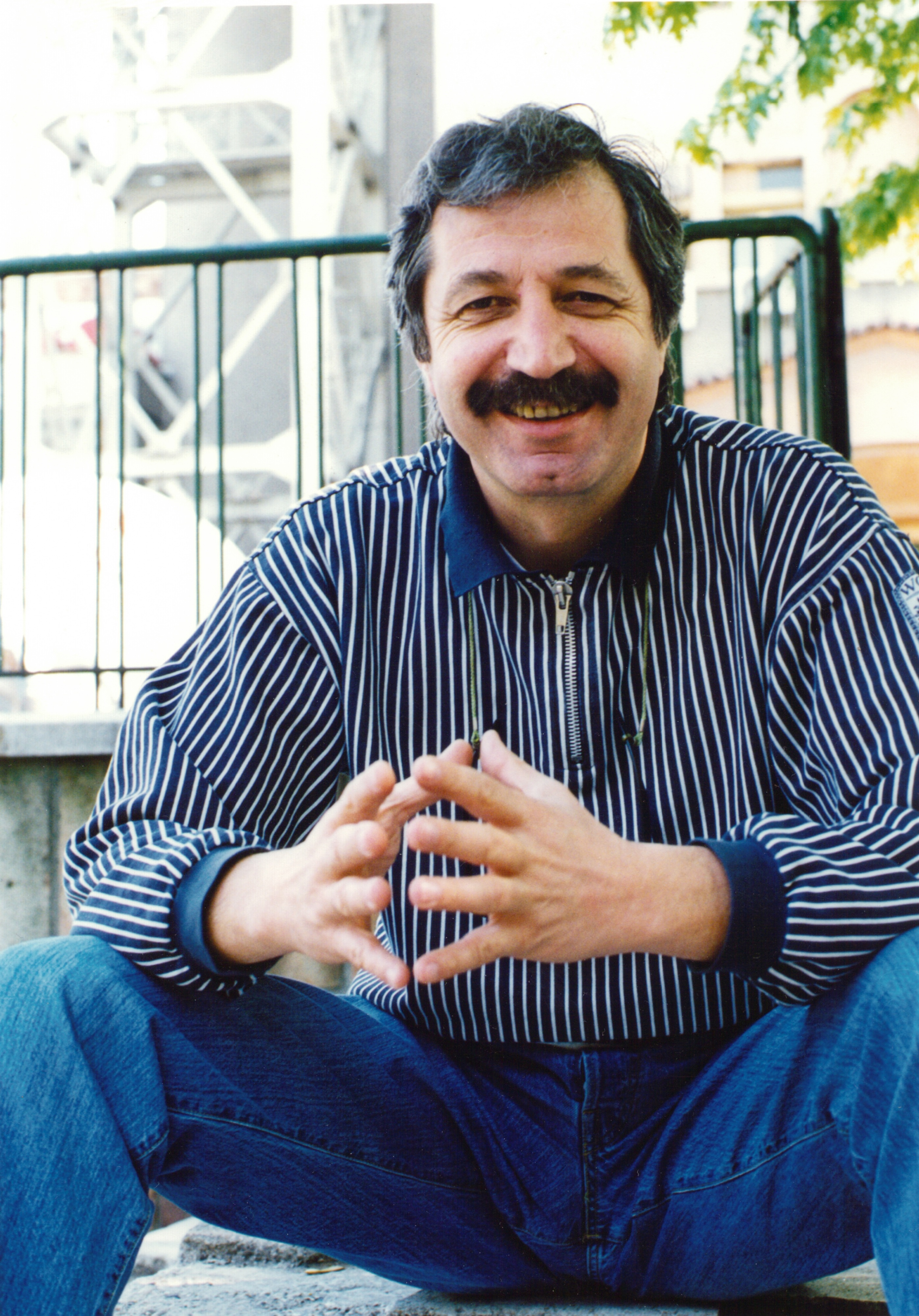 Вујадин Малиша Вујовић